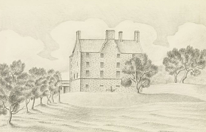 Zeichung von Pitreavie Castle in Schottland